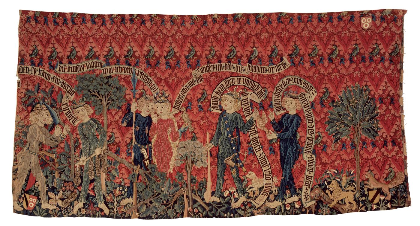 Tapisserie représentant des hommes sauvages chassant un cerf